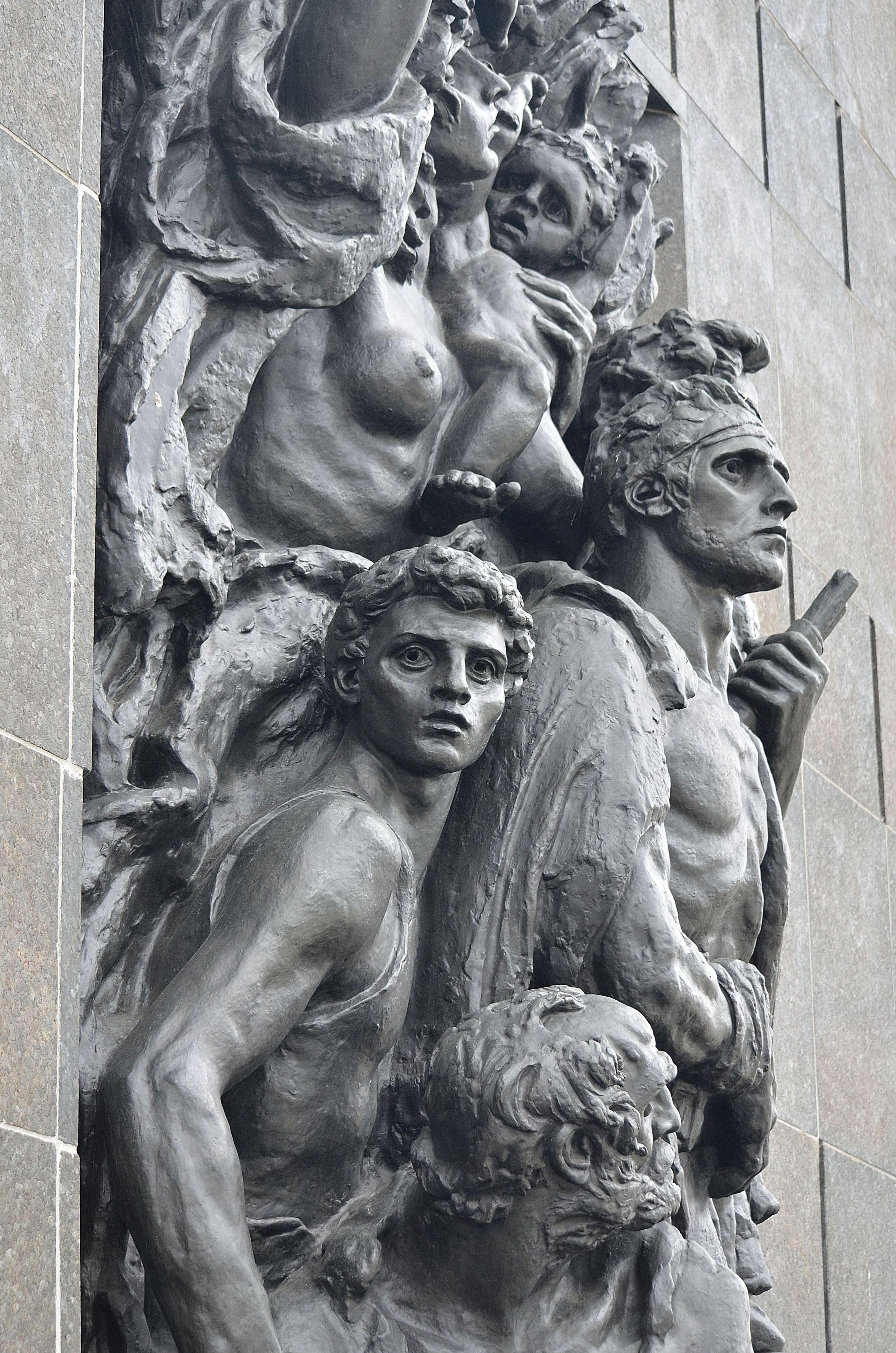 Pomnik Bohaterów Getta w Warszawie